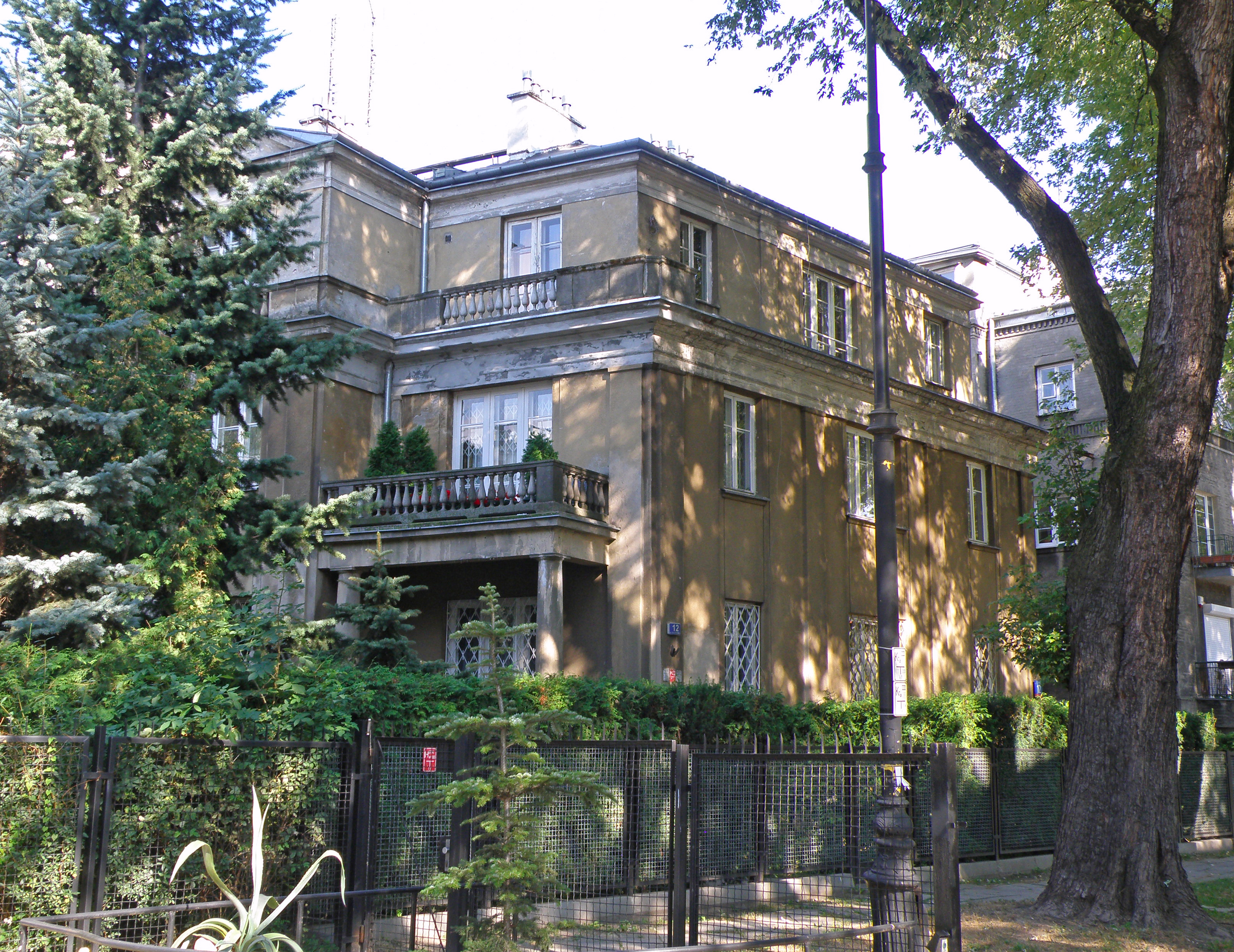 Dom, ok. 1930 (973 A z 13.06.1979) ul. Elsterska 12, Warszawa.